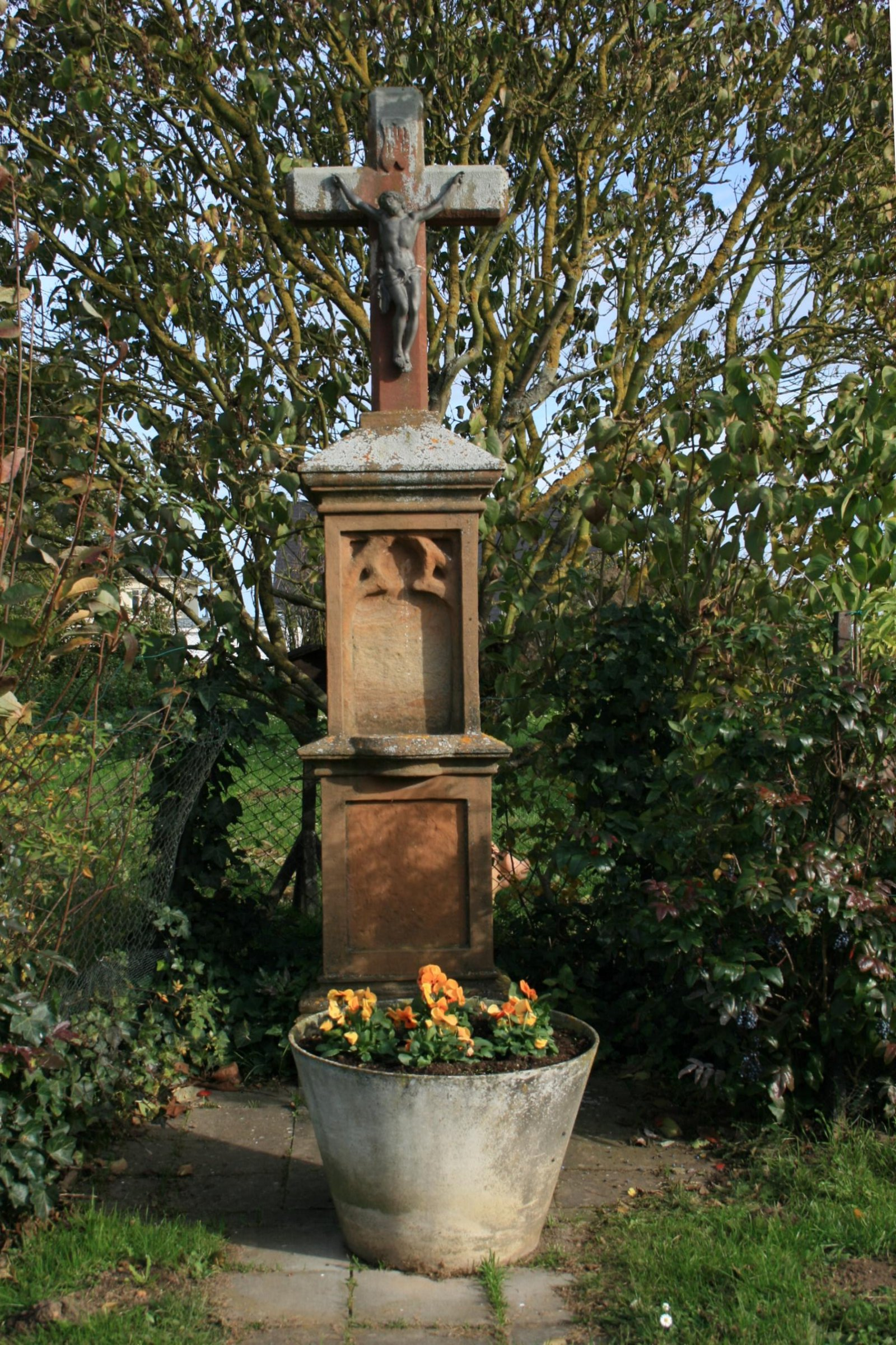 Das Wegekreuz in der Erper SDtr. in Nörvenich-Poll